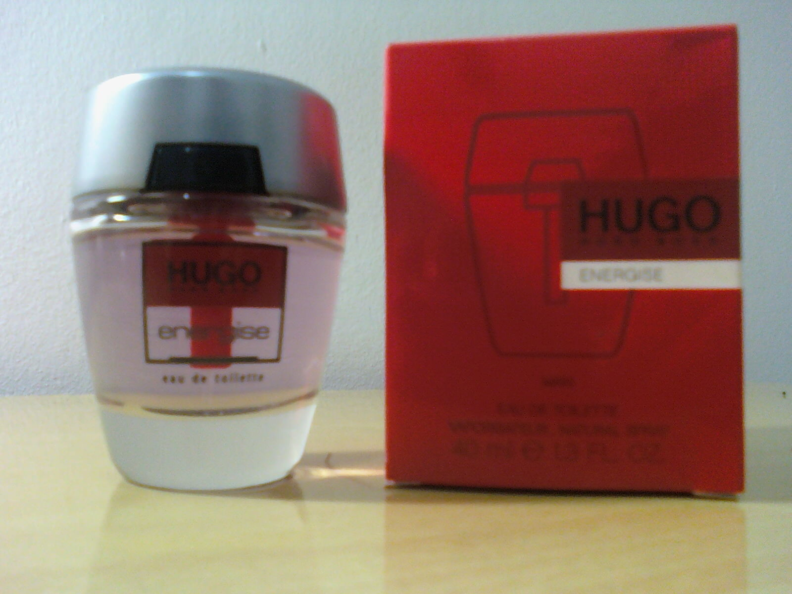 Perfume Hugo Energise